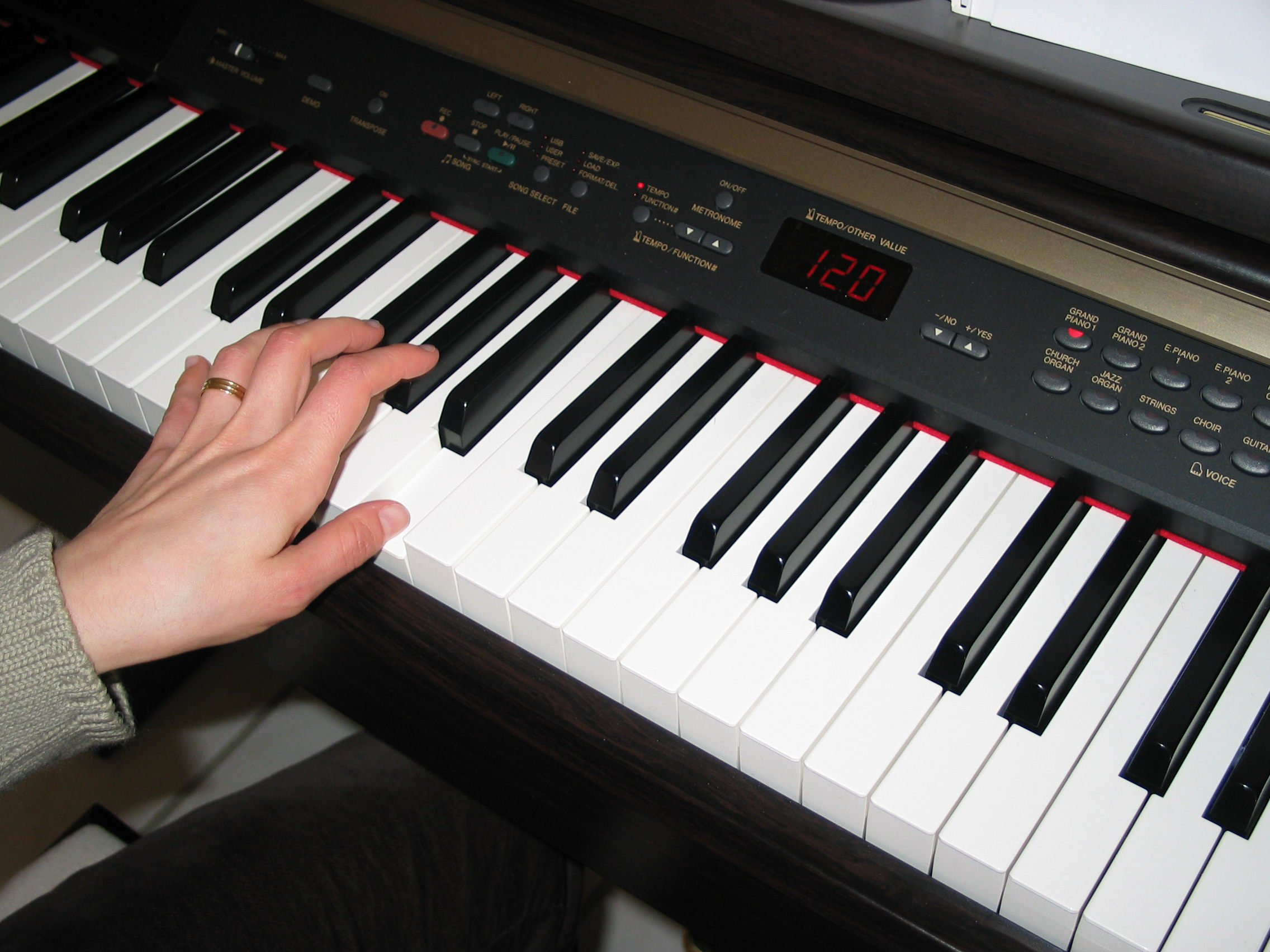 Gros plan sur le clavier d'un Clavinova CLP-240 de chez Yamaha.